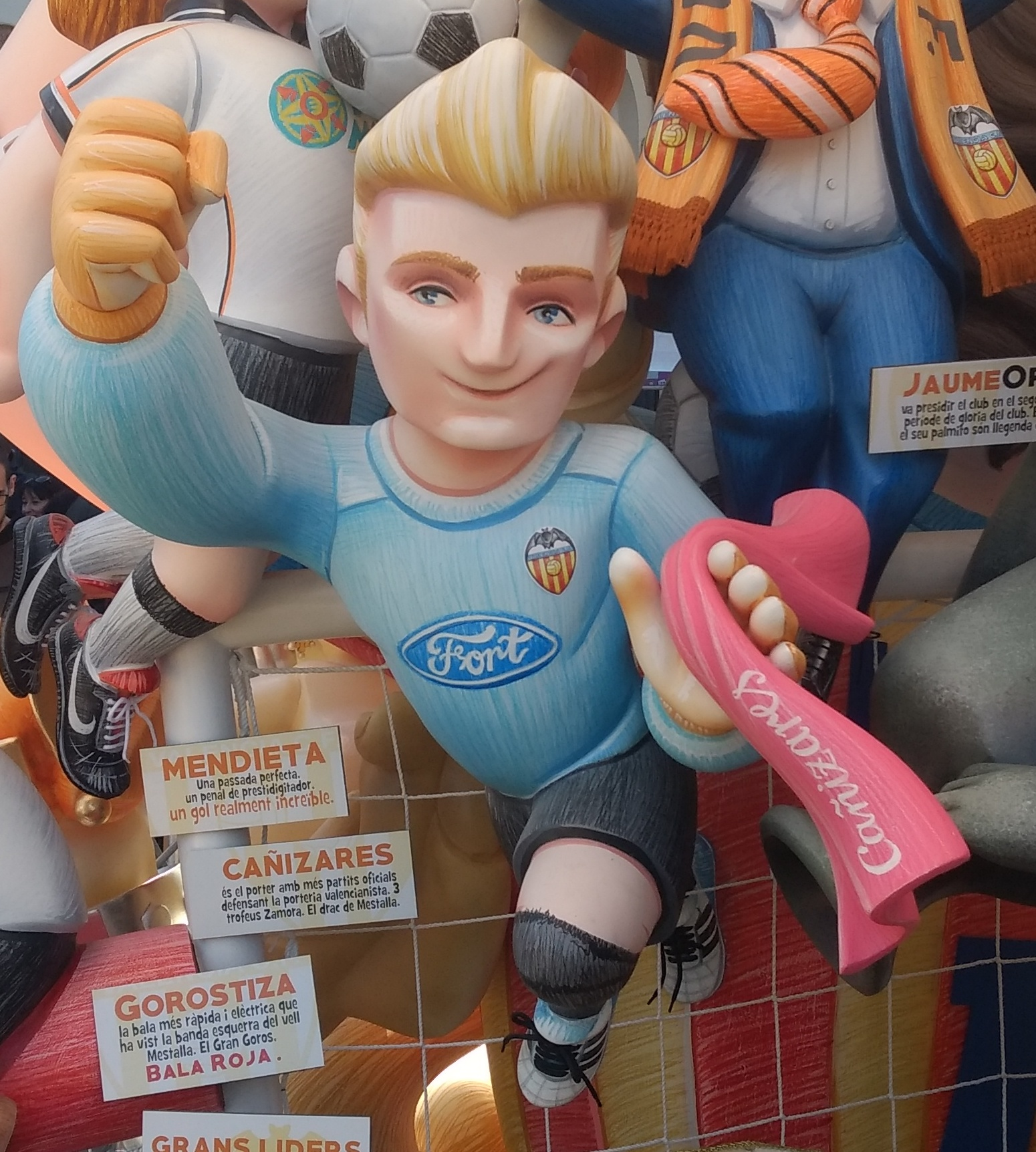 Detalls de la falla infantil Plaça de la Reina, Pau i Sant Vicent 2019 This is a photography of a Folklore festival in Spain (Wikidata id Q1143768).